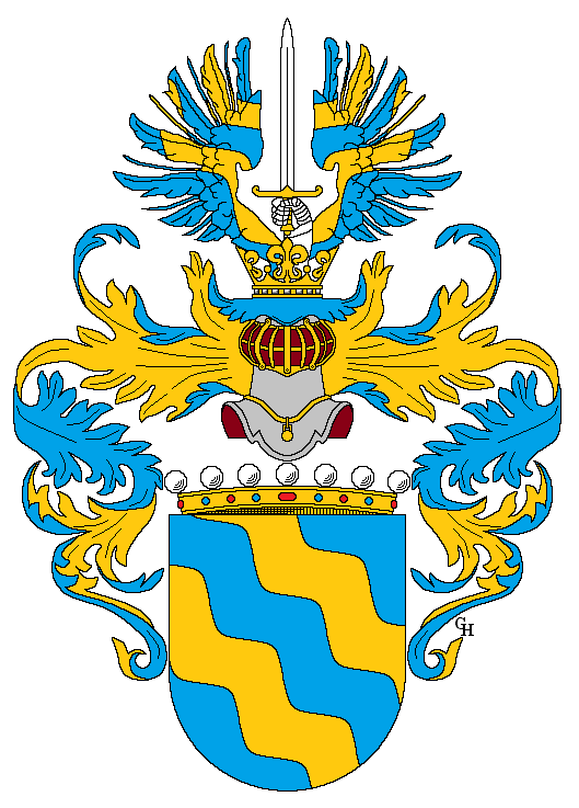 Wappen des k.u.k. Obersten Anton Lehár (1876–1962), verliehen anlässlich seiner Erhebung in den österreichischen Freiherrenstand als Ritter des Militär-Maria-Theresien-Ordens 1918. Zeichnung von Gerd Hruška ( Für weitere Informationen zu dieser Standeserhebung siehe (